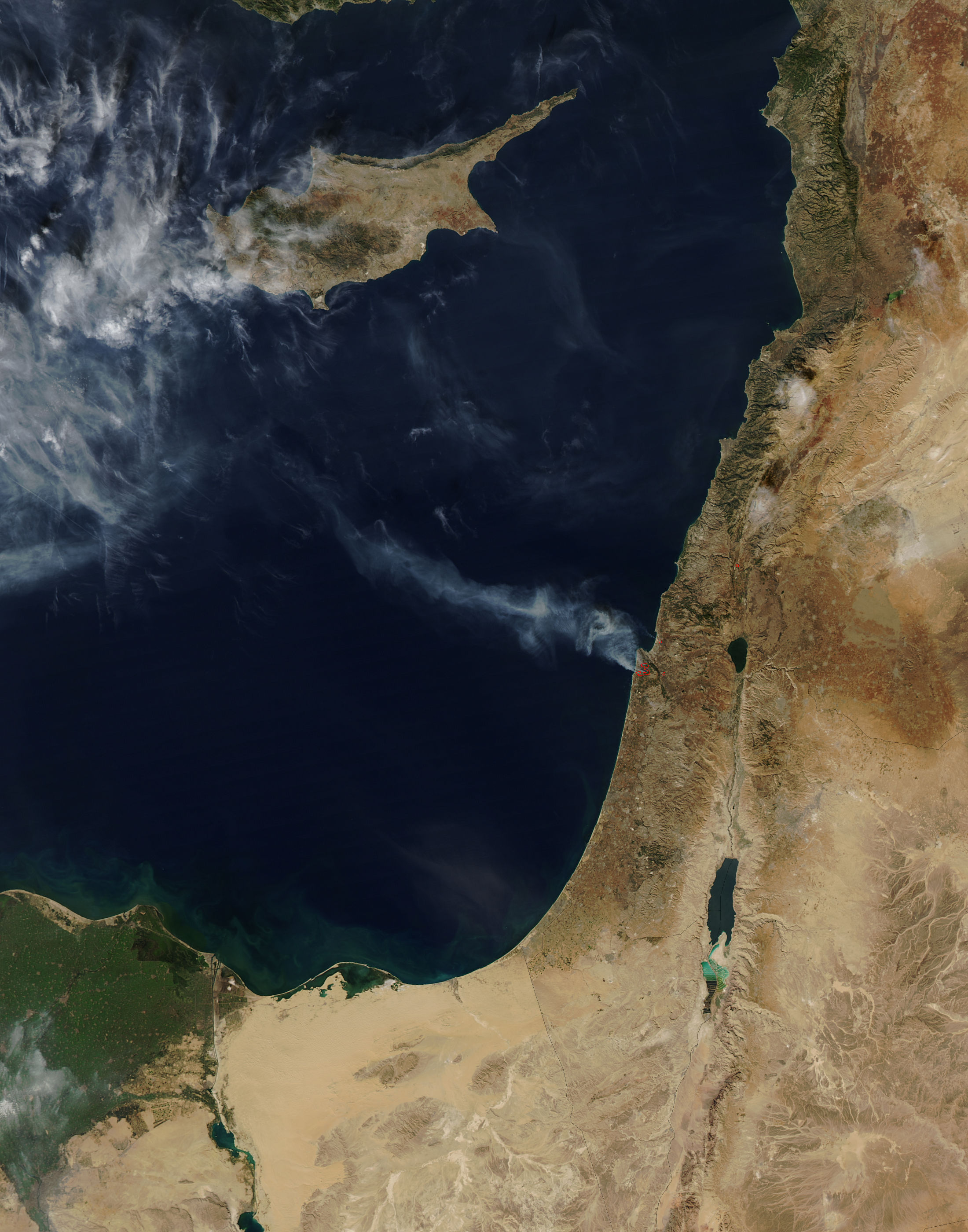 ענן העשן של השריפה כפי שצולם על ידי לווין